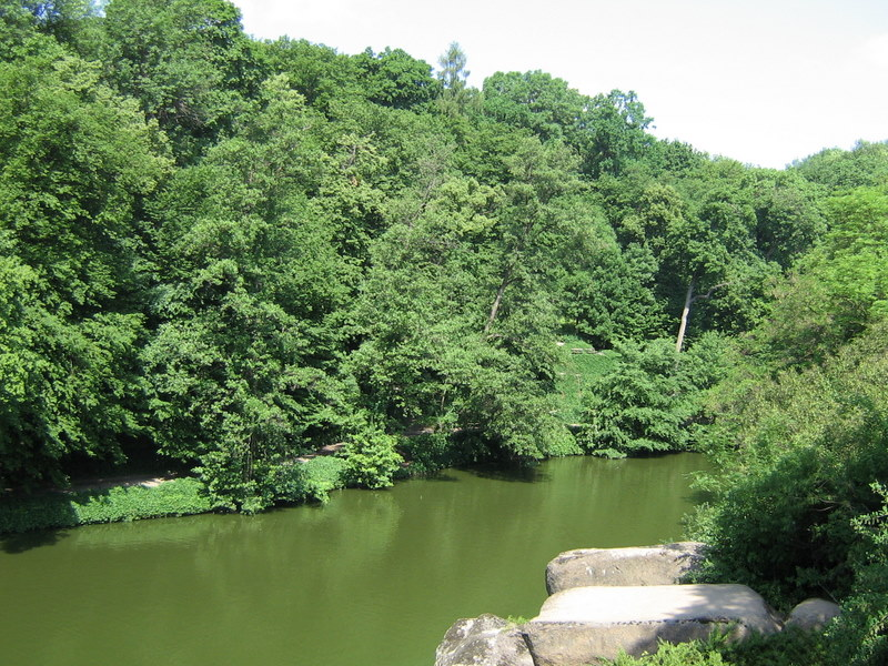 Вид на Нижнее озеро.